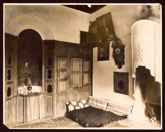 Робевата къща